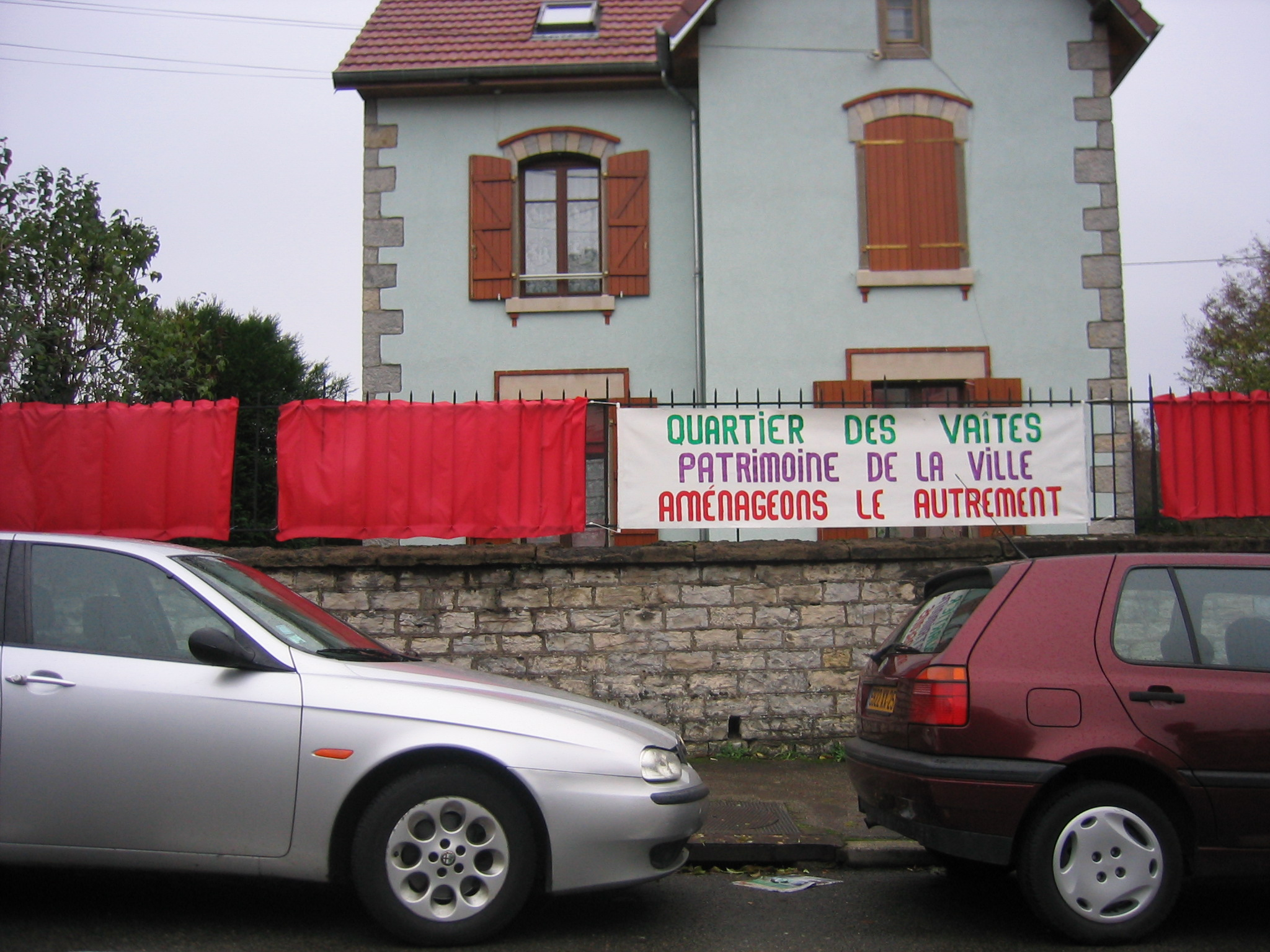 banderoles rouges et message des habitants des vaîtes